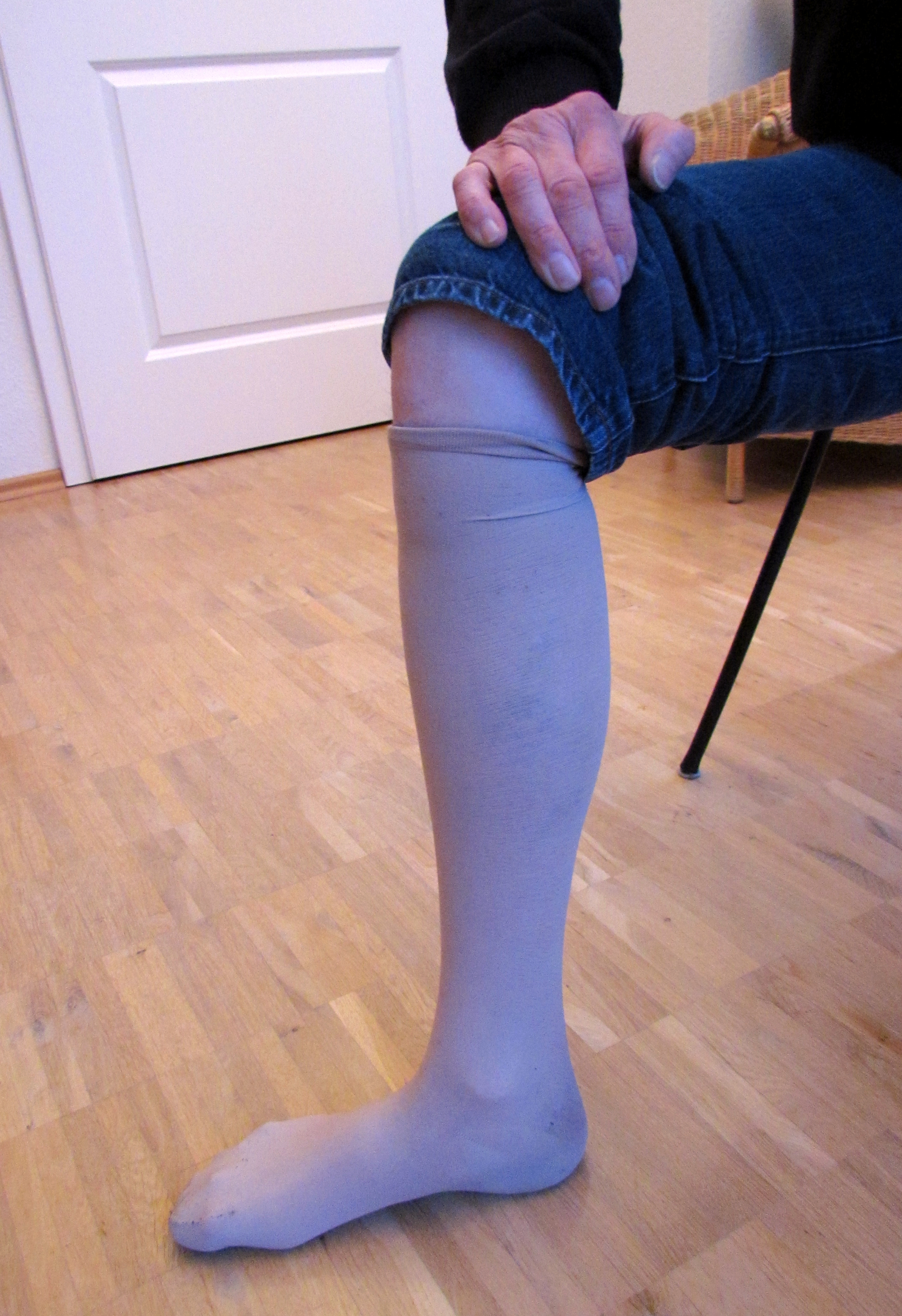 Bildinhalt: Ein Stützstrumpf am rechten Unterschenkel eines Mannes Aufnahmeort: Achern, Deutschland